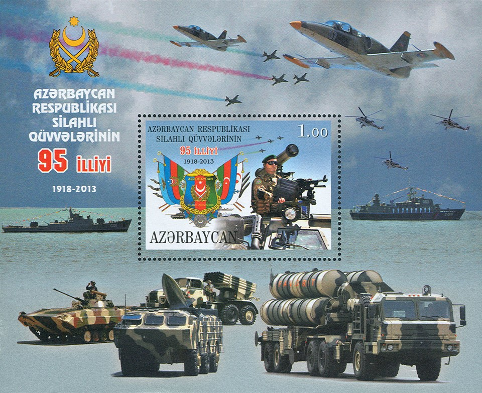 N 1111 - 1 manat. The 95th Ann. of the Armed Forces of the Republic of Azerbaijan.